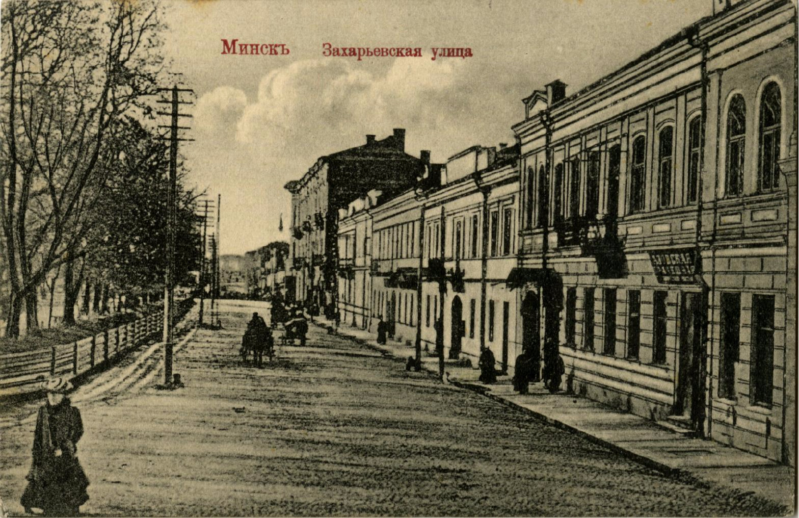 Беларуская (тарашкевіца): Менск (Miensk), вуліца Захараўская (vulica Zacharaŭskaja) каля скрыжаваньня з Кашарскай (vulica Kašarskaja)